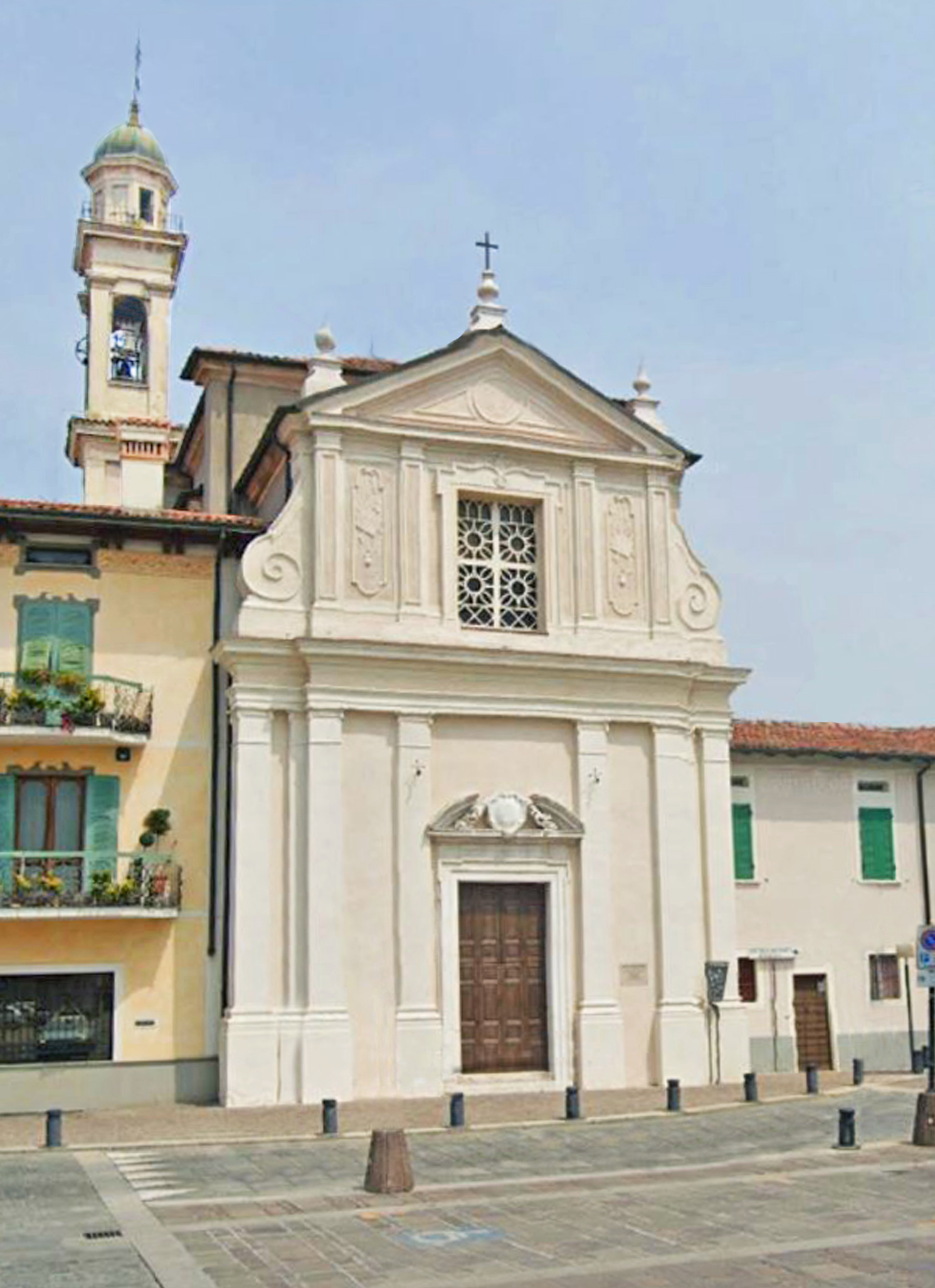 Chiesa del Suggragio, Travagliato